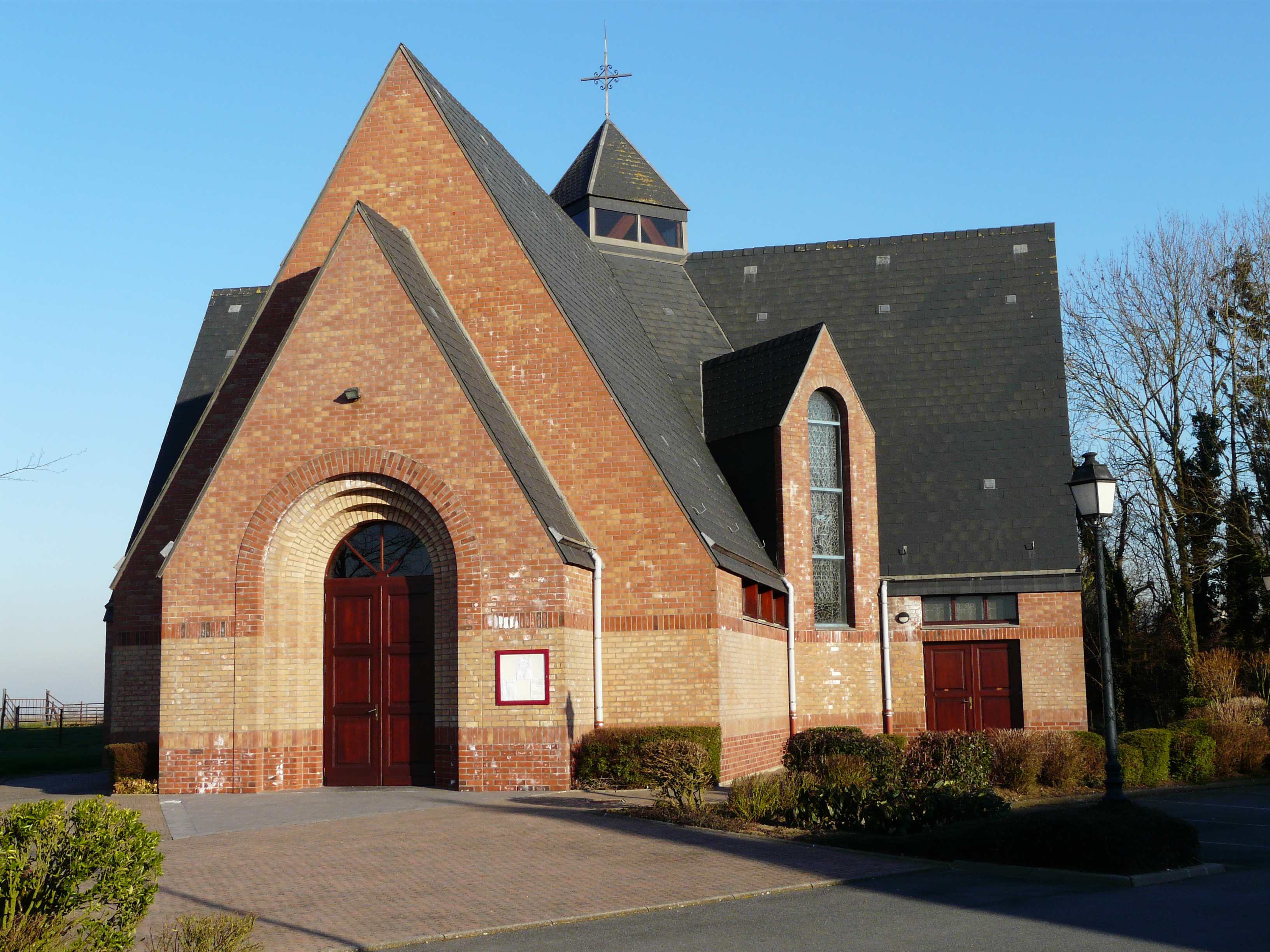 L'église de Raillencourt